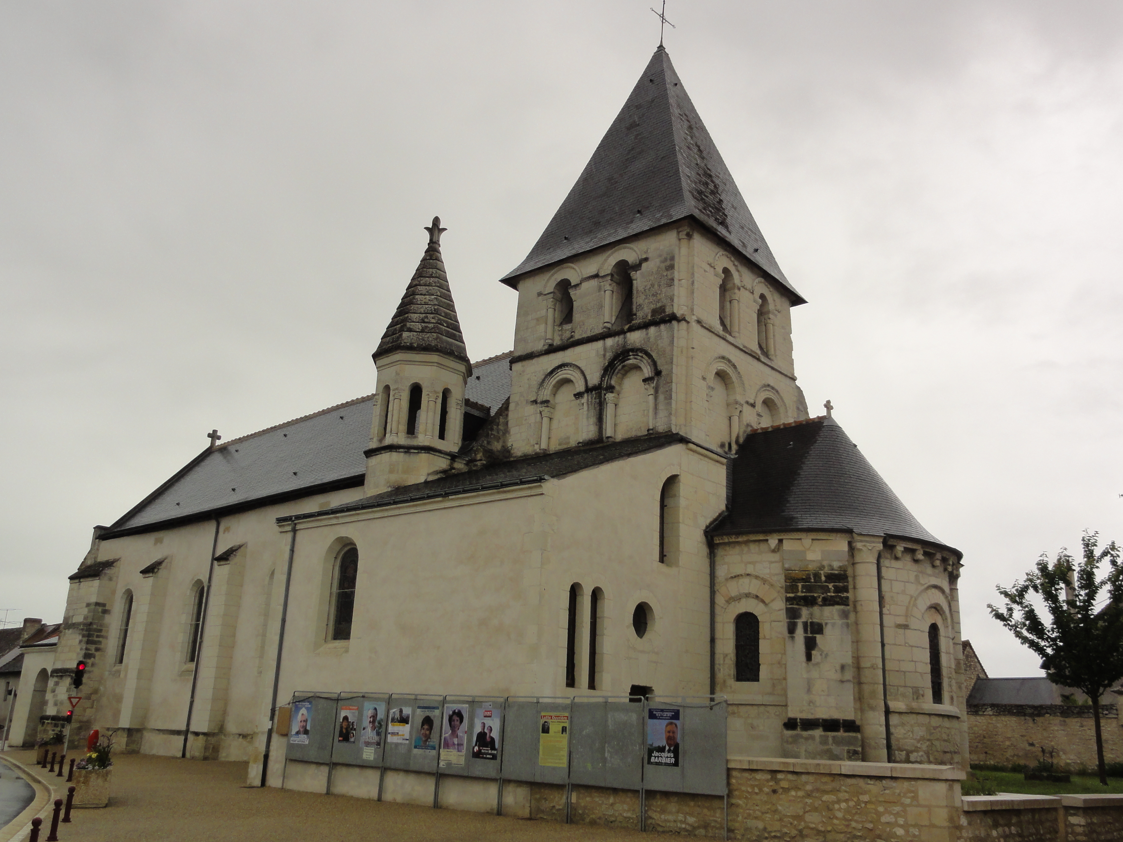 La Celle-Saint-Avant (Indre-et-Loire) Église, chevet This building is indexed in the Base Mérimée, a database of architectural heritage maintained by the French Ministry of Culture, under the references PA00097619 and inscrit .